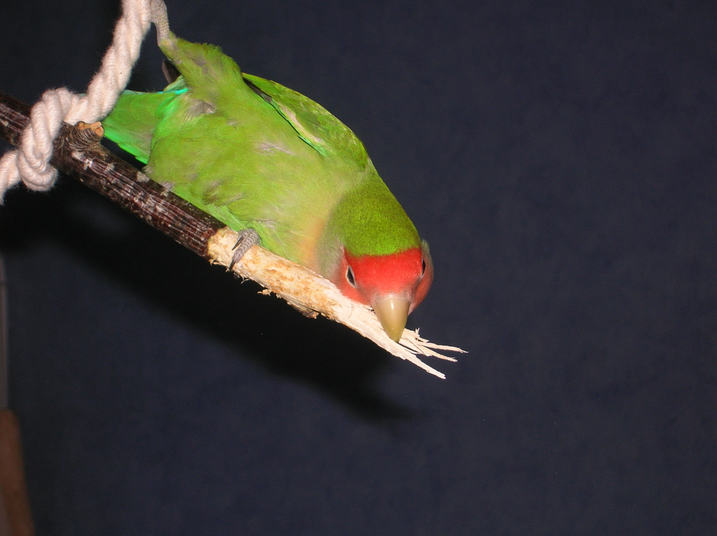 RIP Taiko von Rosenhodet, Taiko A.Roseicollis playing